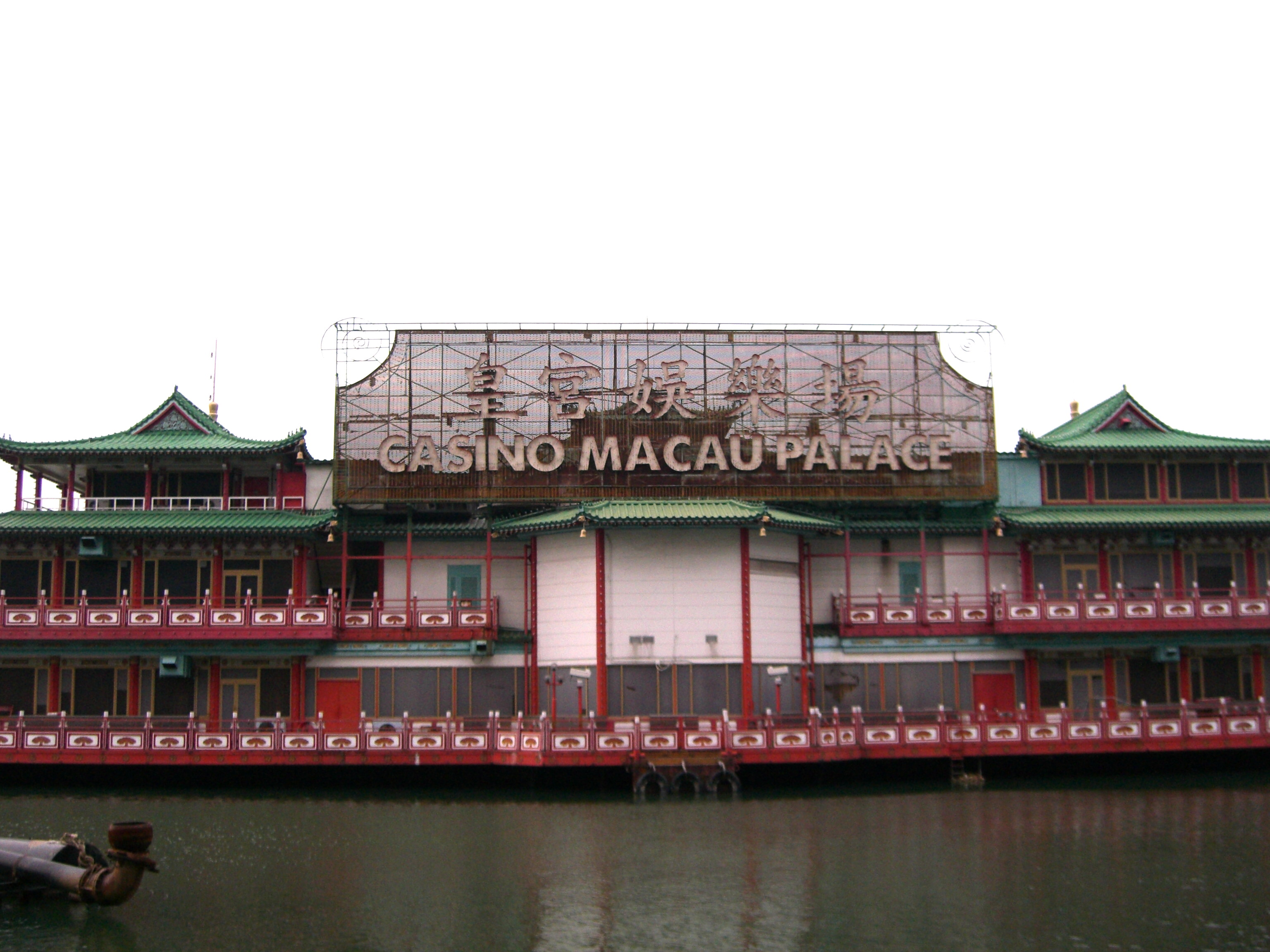 Casino Macau Palace